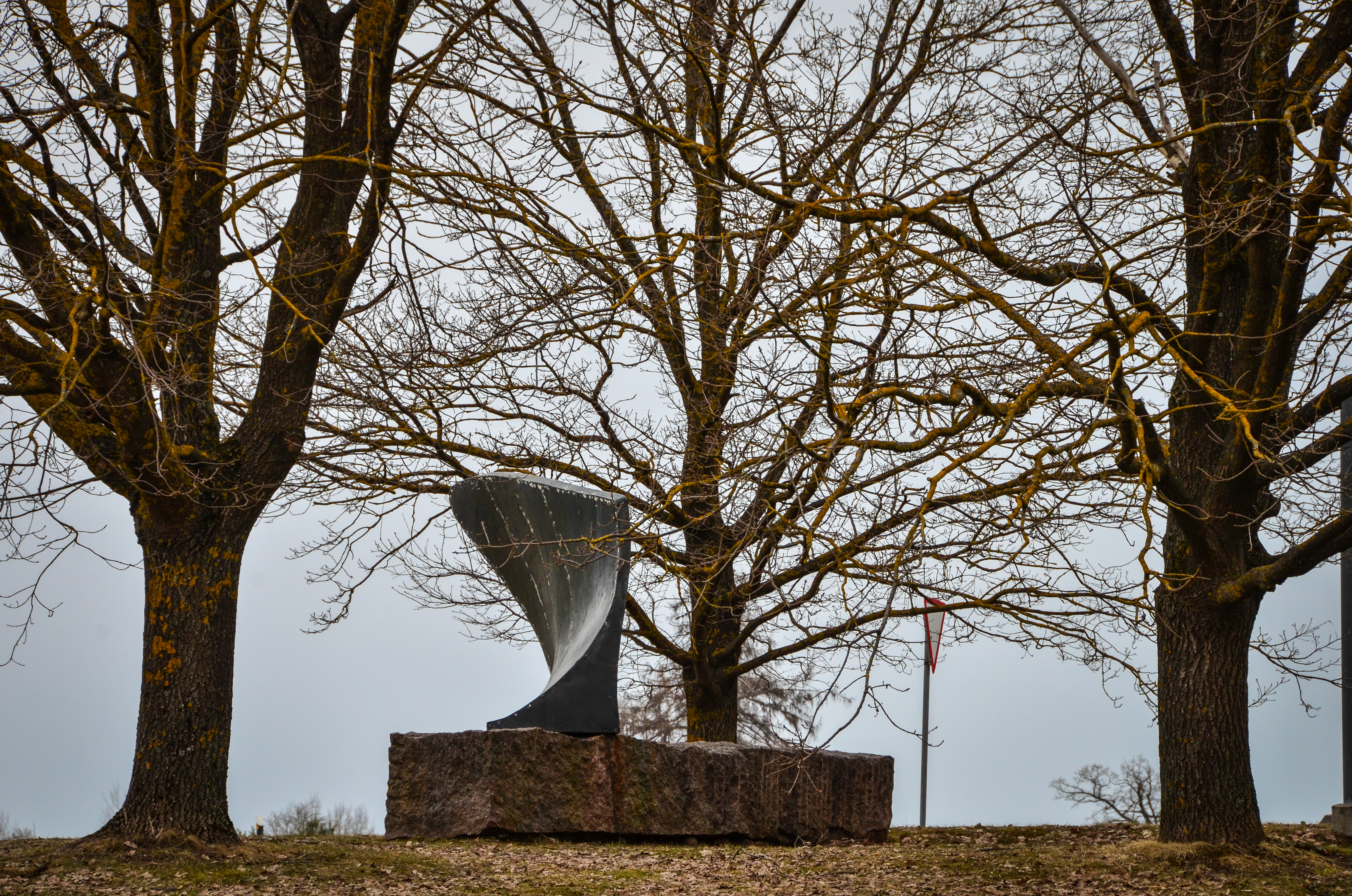 Vaade Mammaste küla Adra pargile